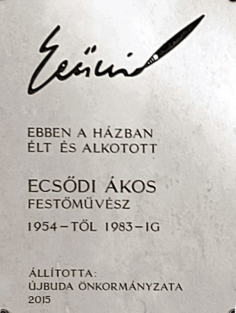 Ecsődi Ákos emléktáblája (Budapest XI., Bartók Béla út 51